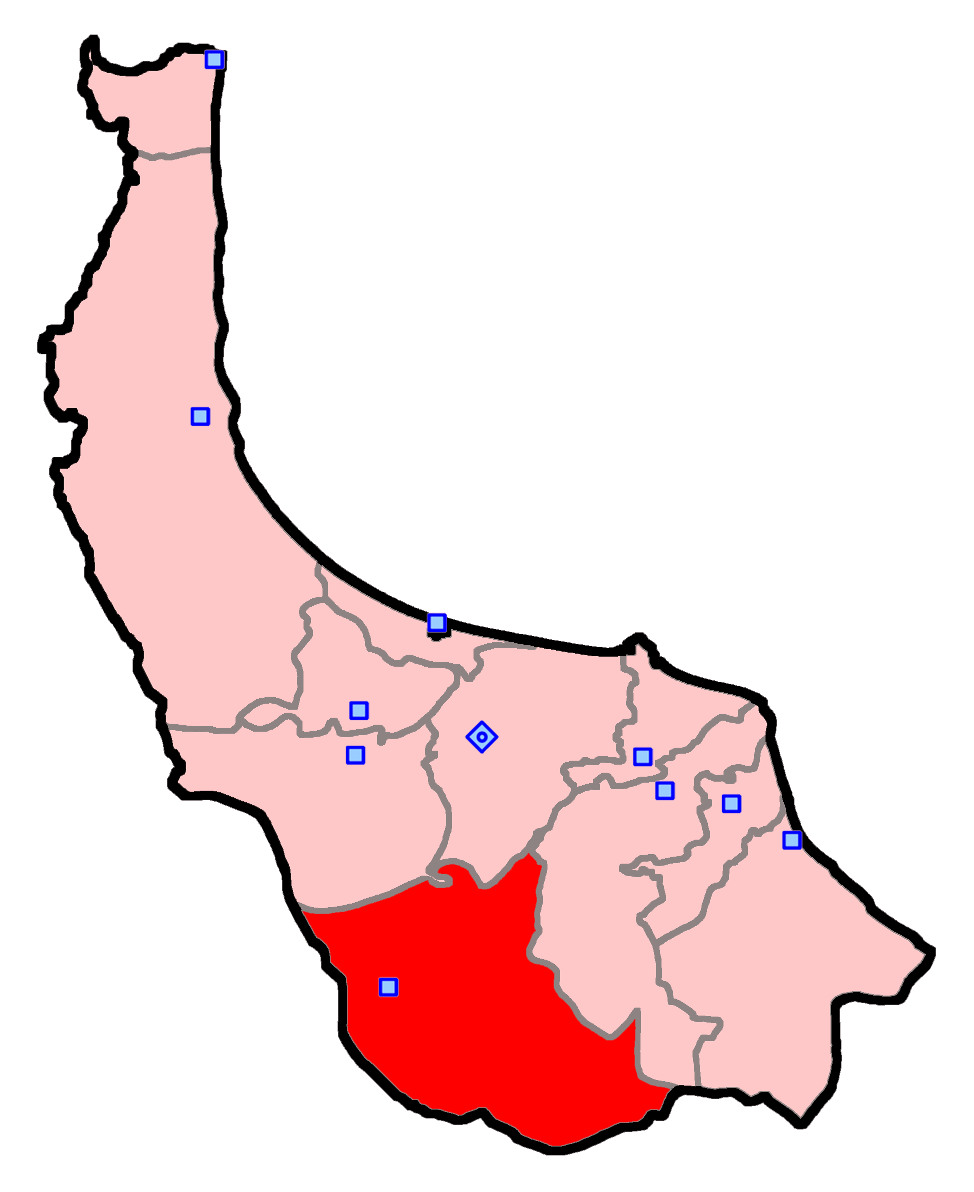 رودبار برای انتخابات مجلس شورای اسلامی